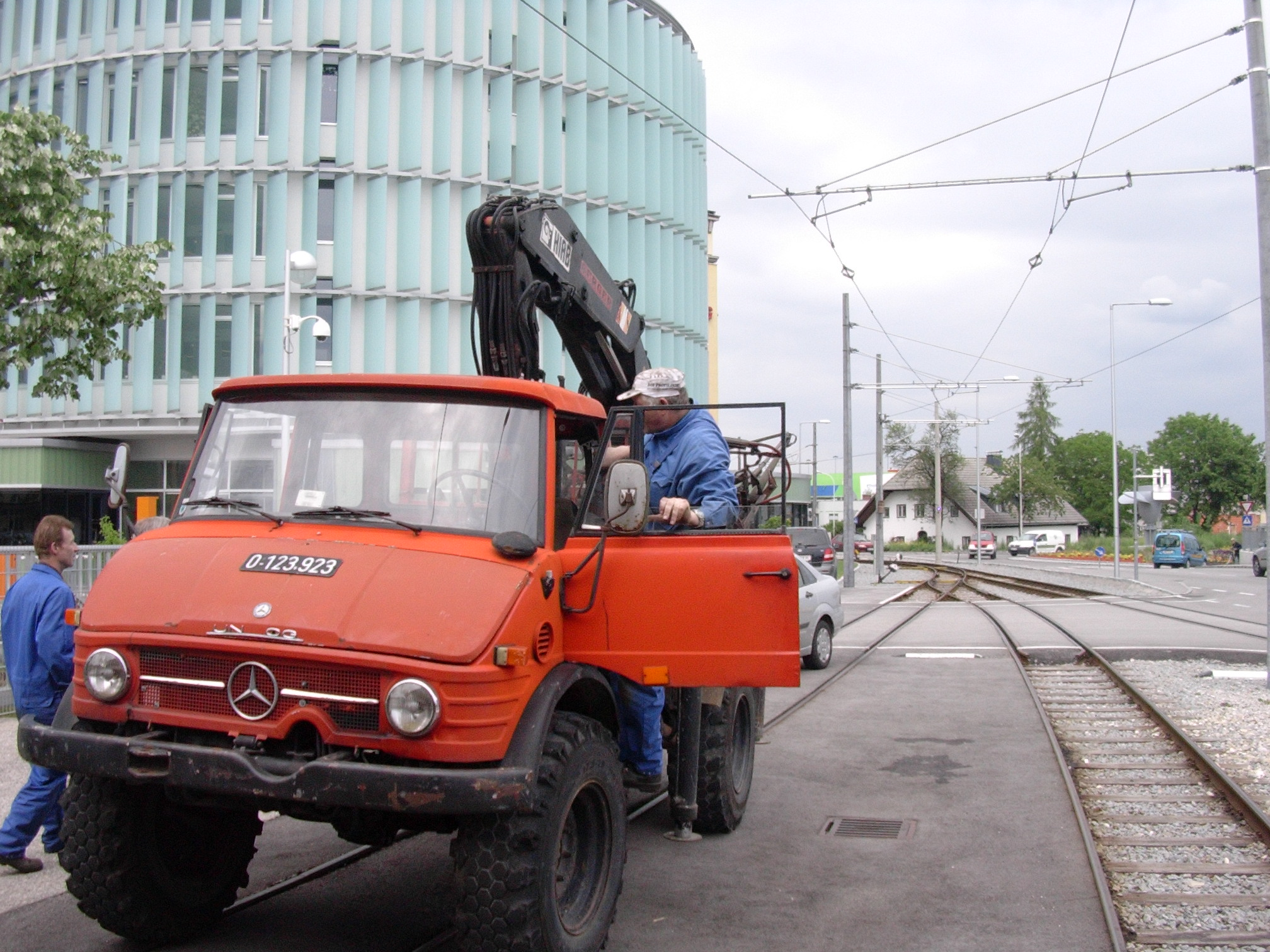 Stern & Hafferl LKW mit Stromabnehmer